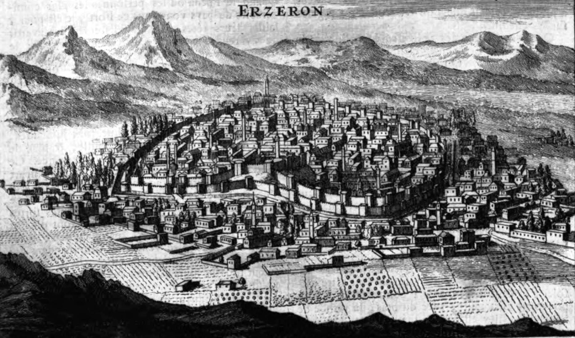 Relation d'un voyage du Levant: fait par ordre du Roi : contenant l'histoire ancienne & moderne de plusieurs isles de l'Archipel, de Constantinople, des Côtes de la Mer Noire, de l'Armenie, de la Georgie, des frontières de Perse & de l'Asie Mineure.